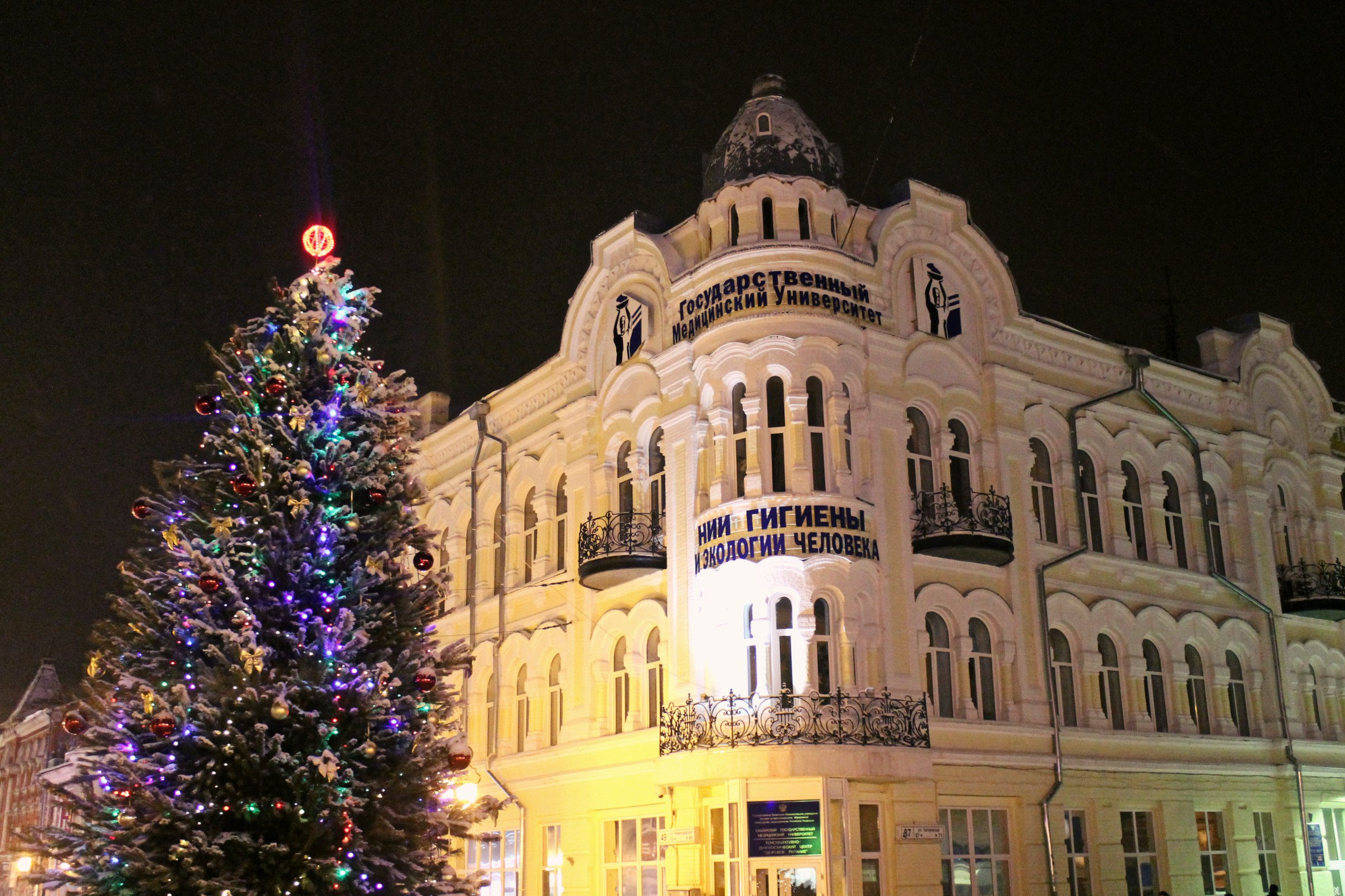 Корпус Самарского государственного медицинского университета на пересечении улиц Ленинградской и Чапаевской